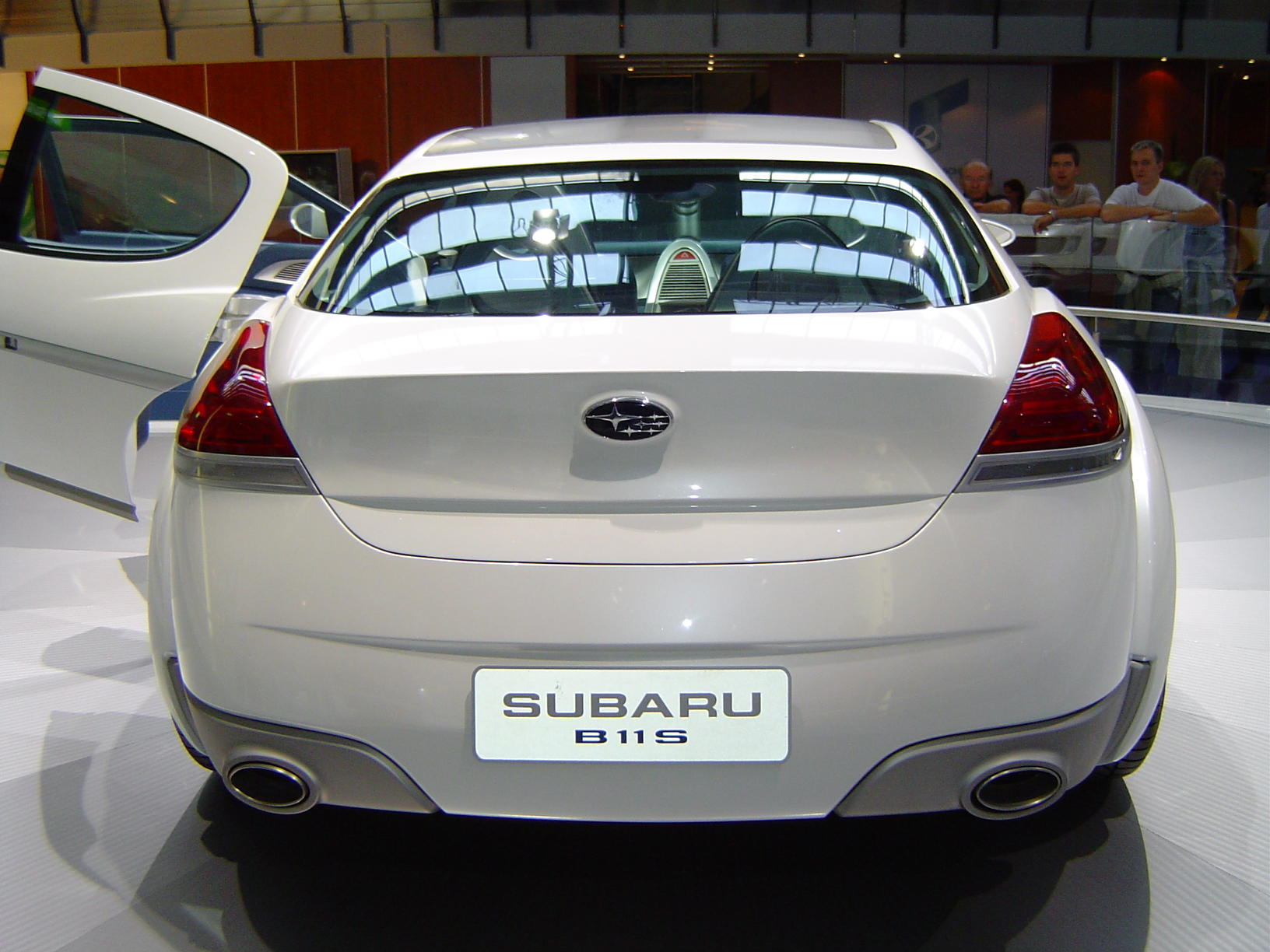 IAA_2003_018